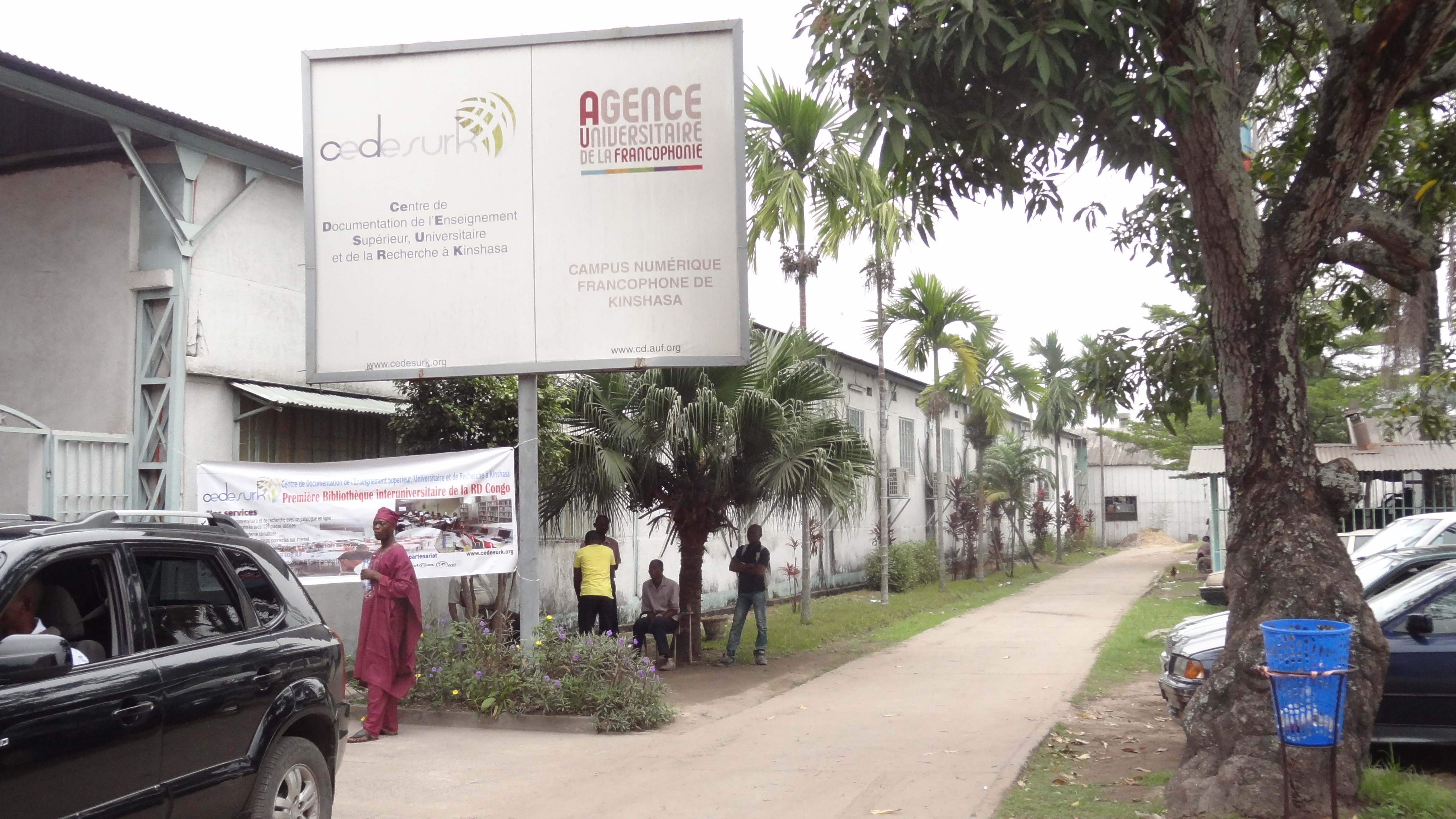 Vue extérieure du CEDESURK, Kinshasa, RDC